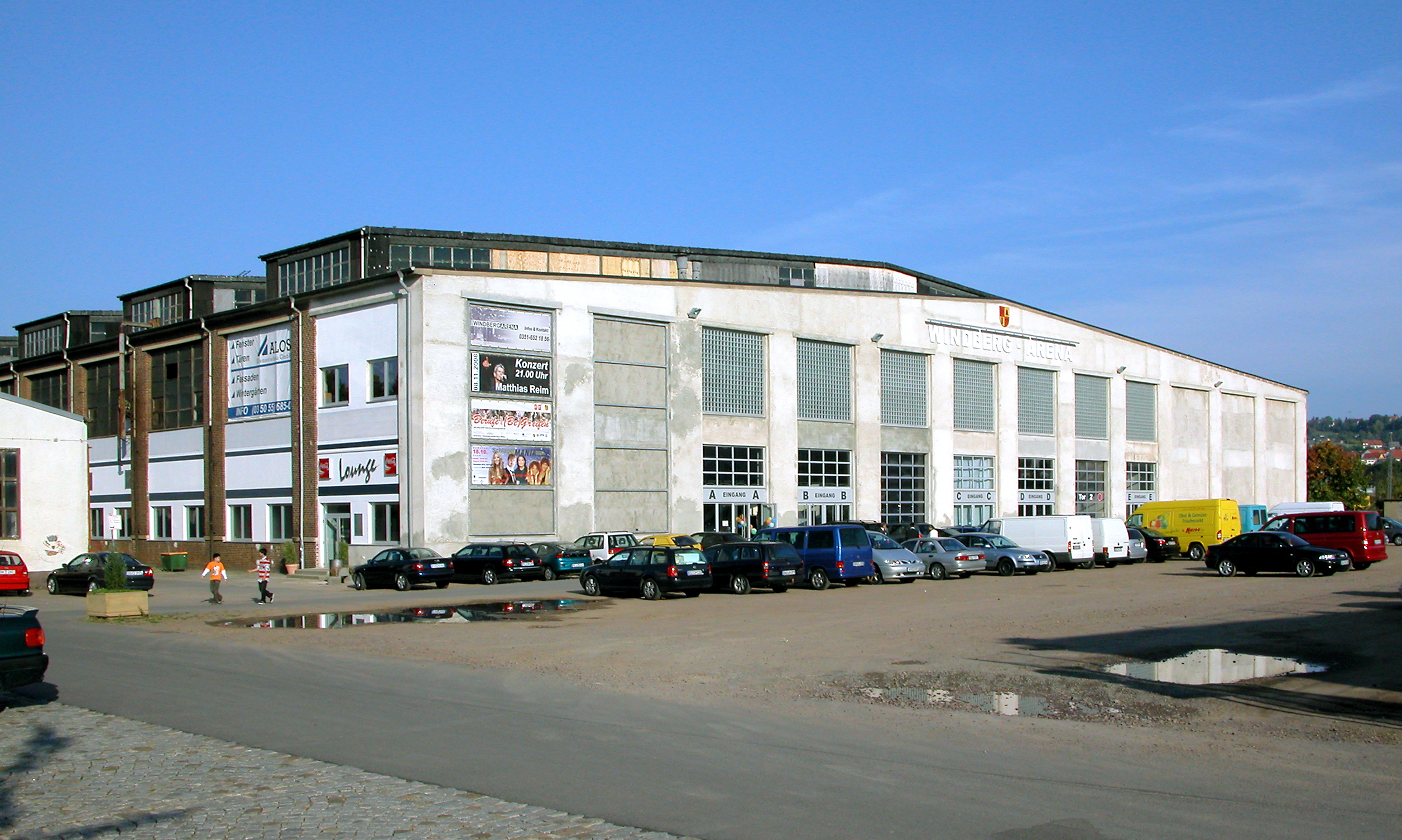 28.09.2008 01705 Freital-Döhlen (Neudöhlen): Die Windberg-Arena (GMP: 51.005465,13.650230), Hüttenstraße 14, entstand durch Umnutzung der Werkhalle des einstigen DDR Plastmaschinenwerkers. Bis 2011 wurde die Halle für Sport- und Kulturveranstaltungen genutzt, dann 2015 abgerissen. Sicht von Südwesten. [DSCN34337.TIF]20080928225DR.JPG(c)Blobelt